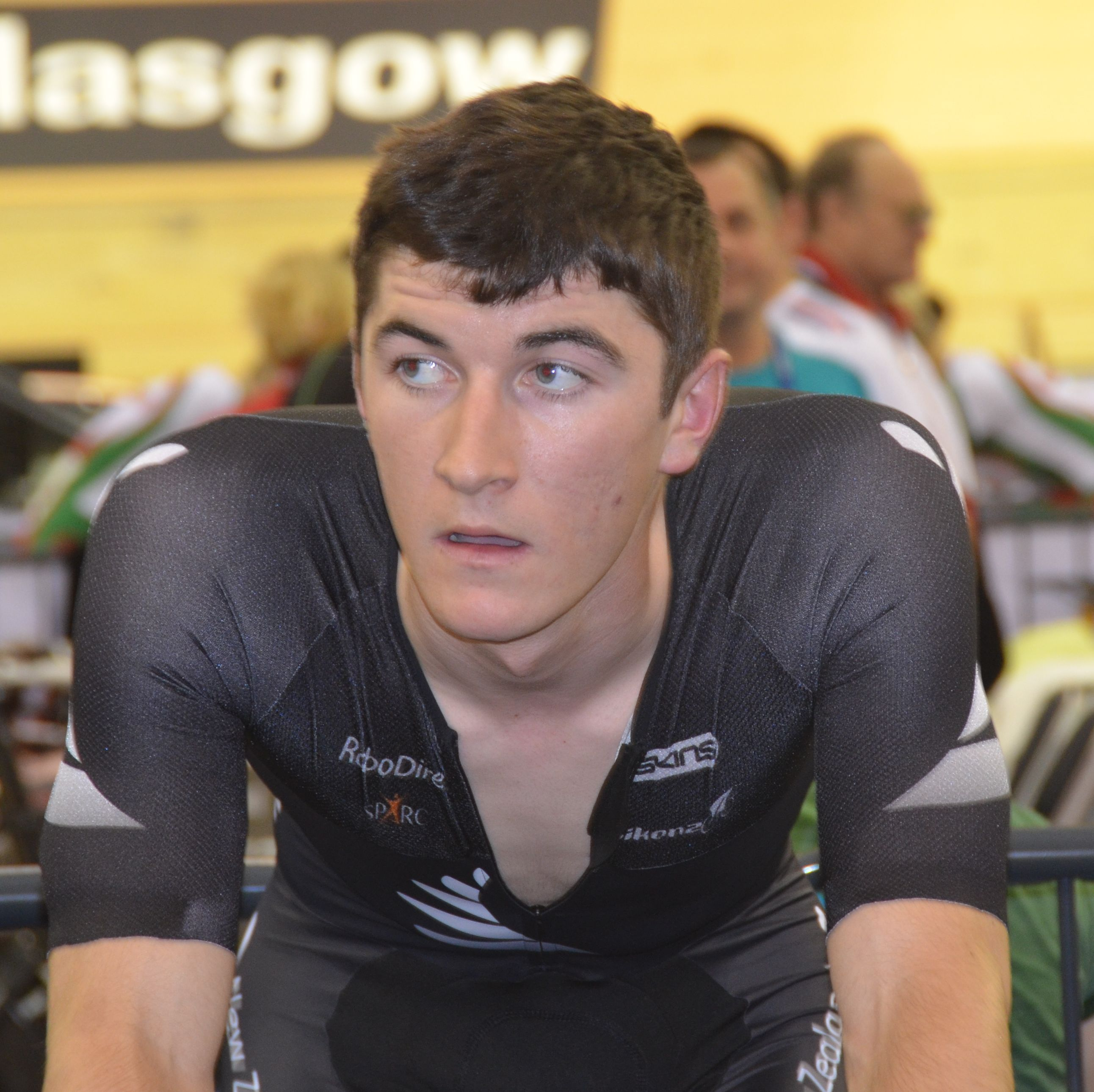 Dylan Kennett, neuseeländischer Radsportler